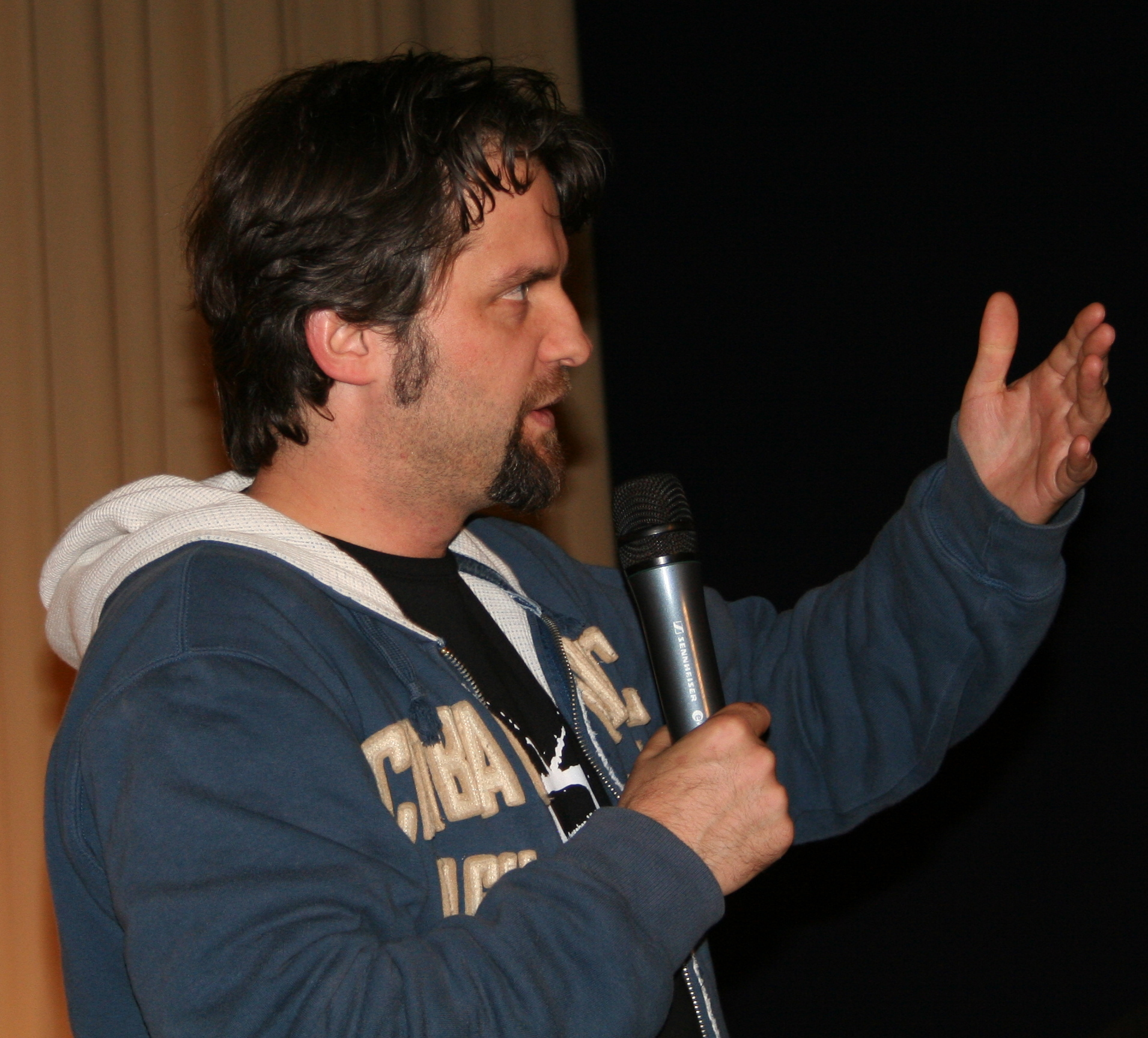 Hans Weingartner im Cineplex Münster bei der Preview seines Films "Free Rainer".